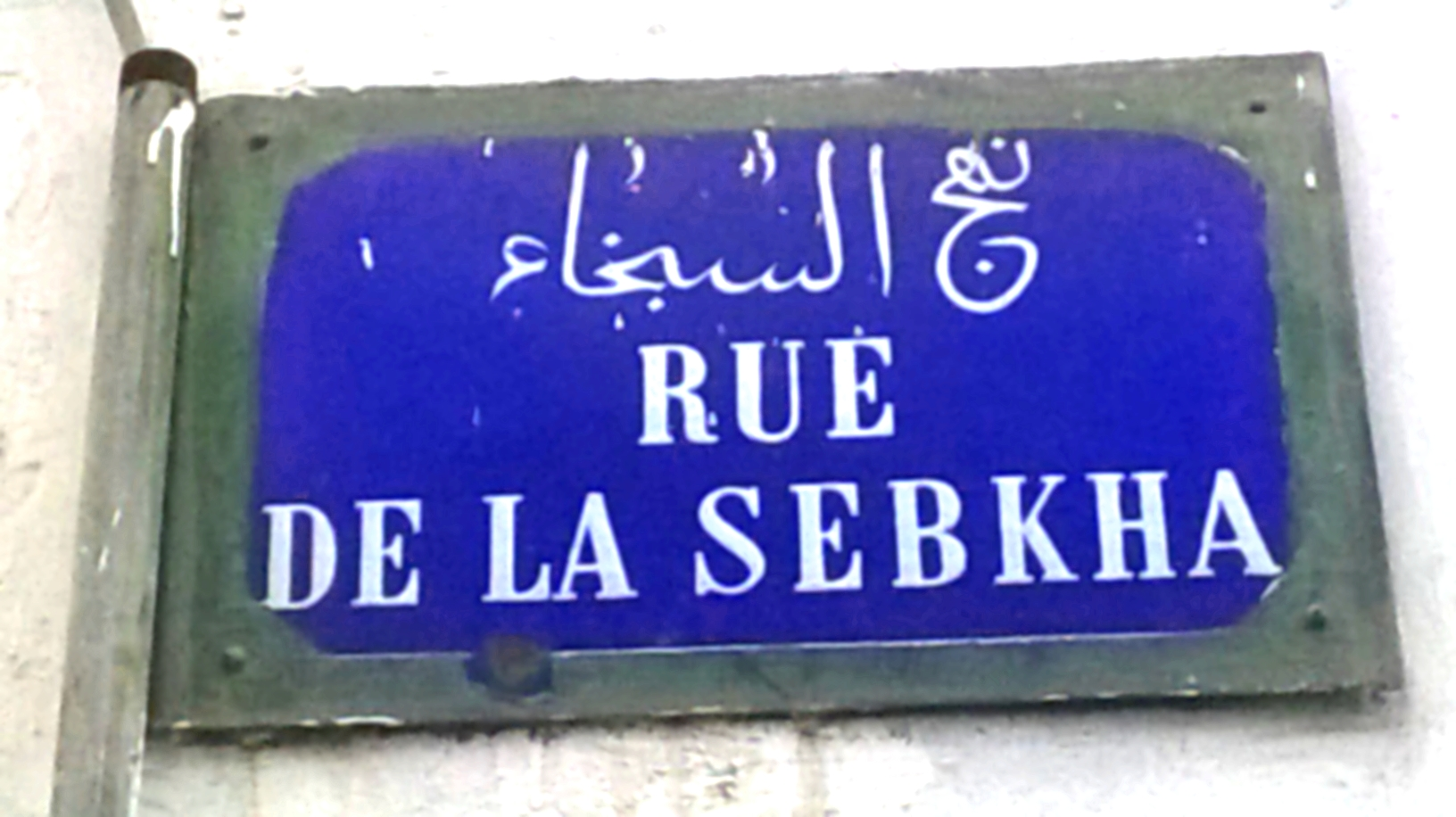 Rue de la Sabkha, Sidi El Béchir, Tunis نهج السبخة، سيدي البشير، تونس العاصمة